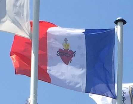 Banderas con el Sagrado Corazón. Memorial Heiho Niten Ichi Ryu.